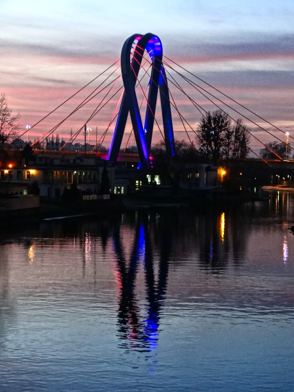 Pylon Trasy Uniwersyteckiej w Bydgoszczy widziany od strony Brdy